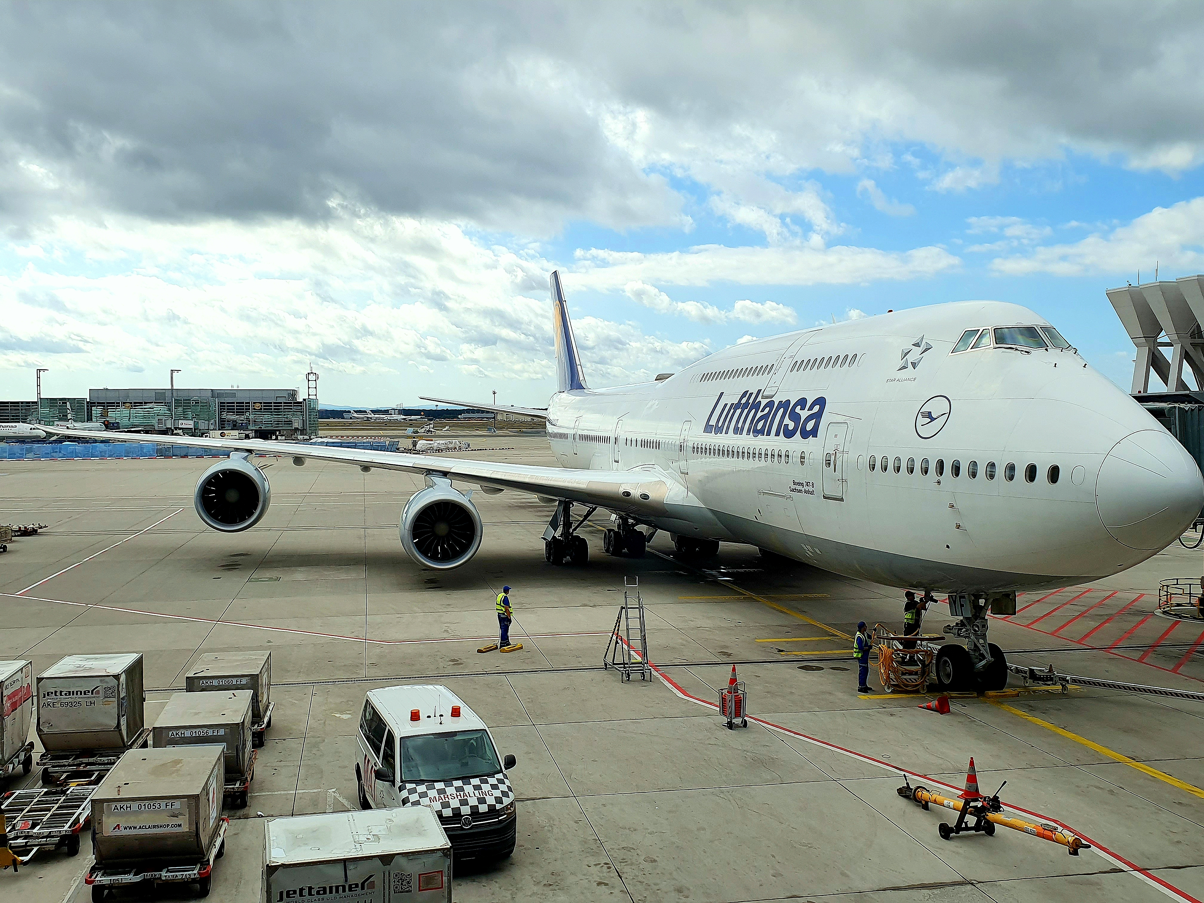 Boeing 747-8 linii Lufthansa (D-ABYF "Sachsen-Anhalt")